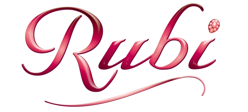 logo de la série